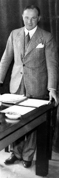 'Arne Meidell' (Q4794630)